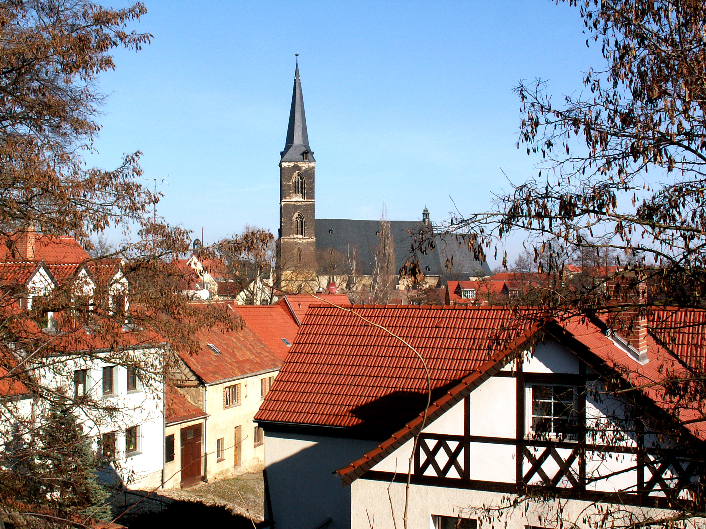 Blick über den Kiethof in der Altstadt zur St.Stefanikirche